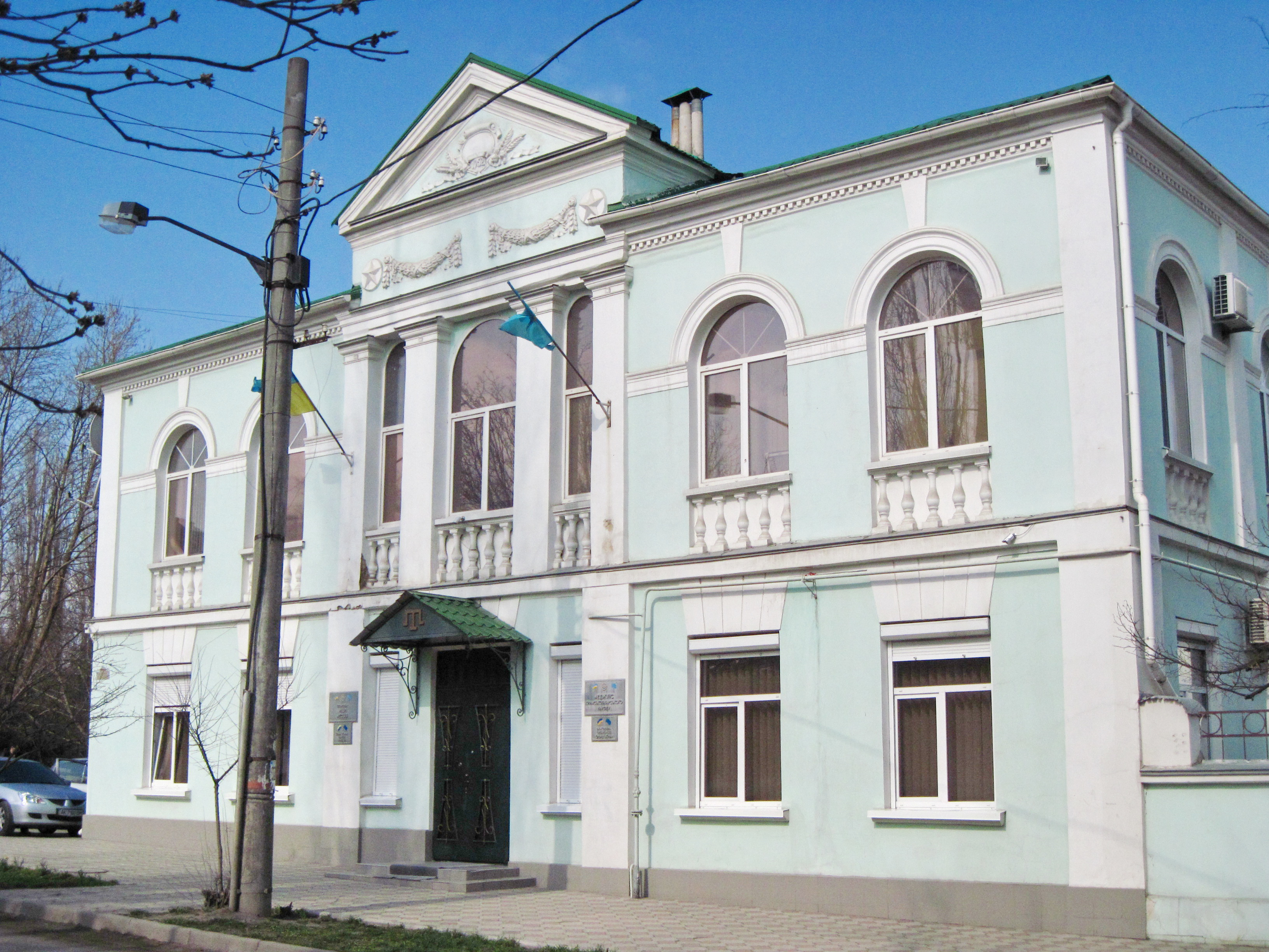 В этом здании находится представительный орган Крымских татар — Меджлис